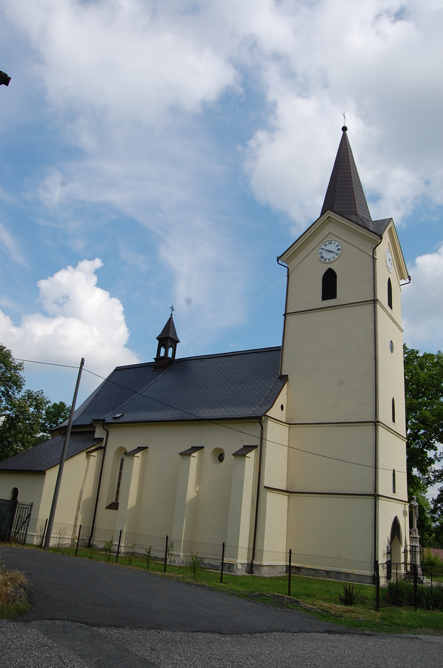 Kostel svaté Anny v Rychvaldě, okres Karviná. Pohled na severní stranu kostela.